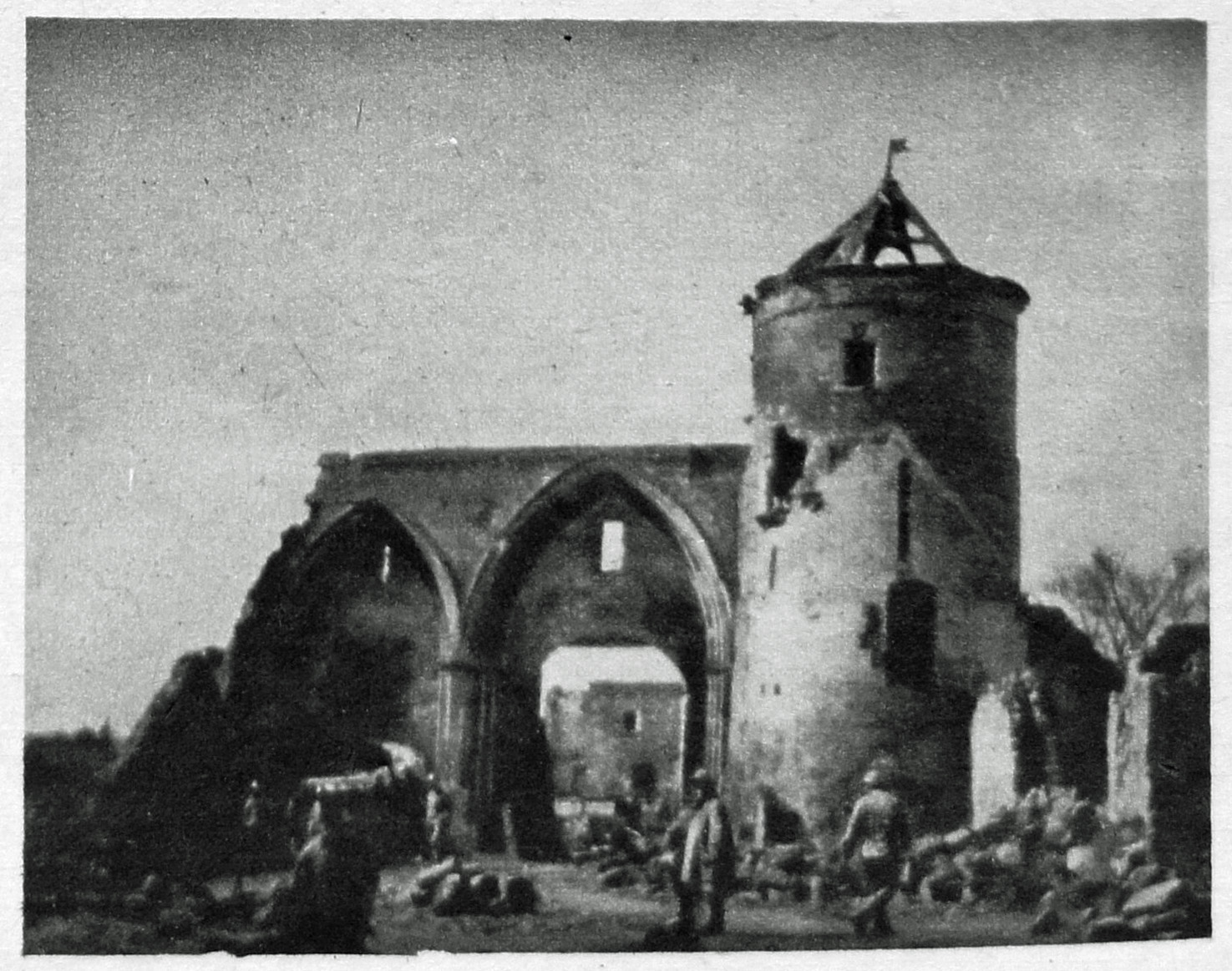 extrait du Le Miroir le 24 juin 1917, page 2.